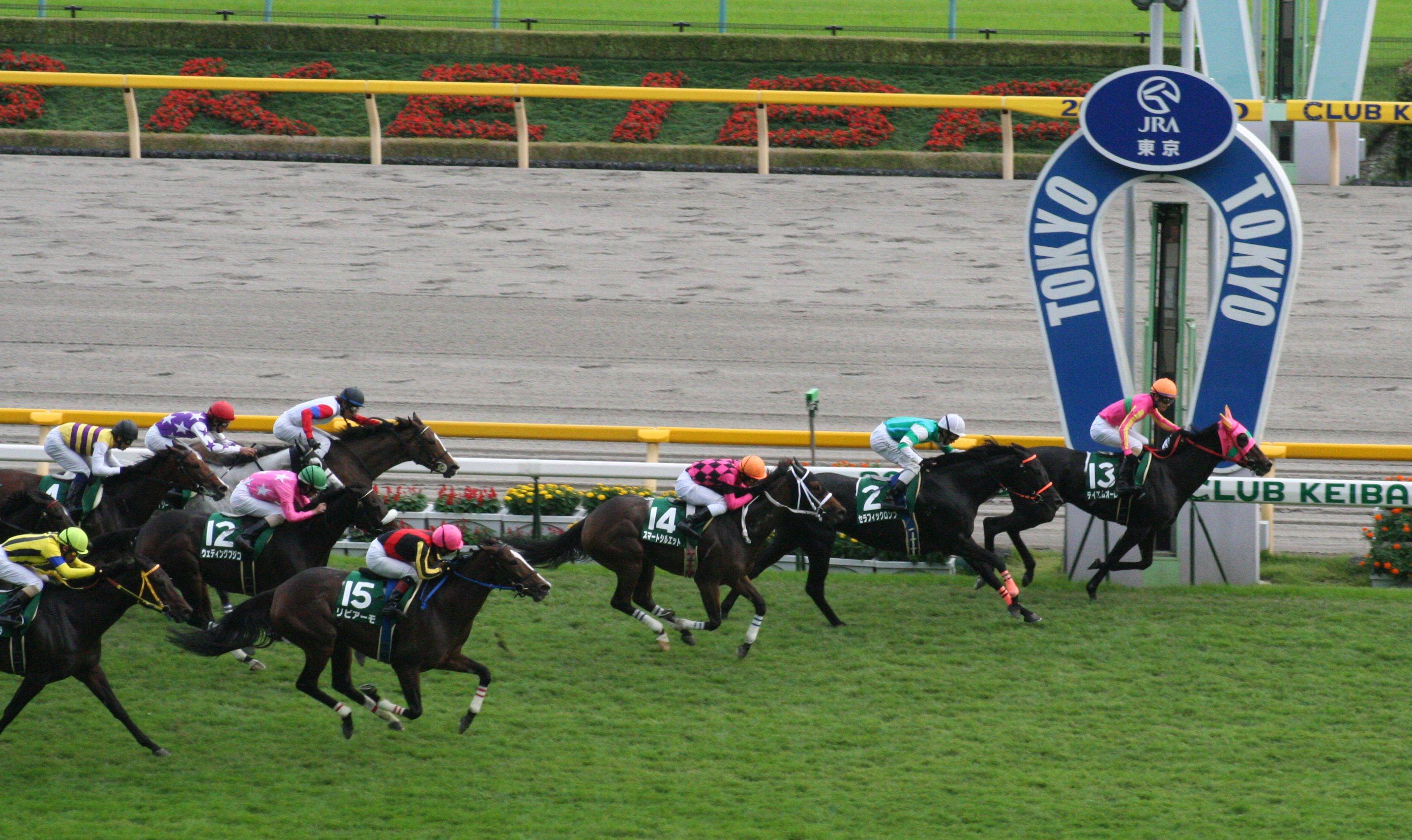 第58回府中牝馬ステークス